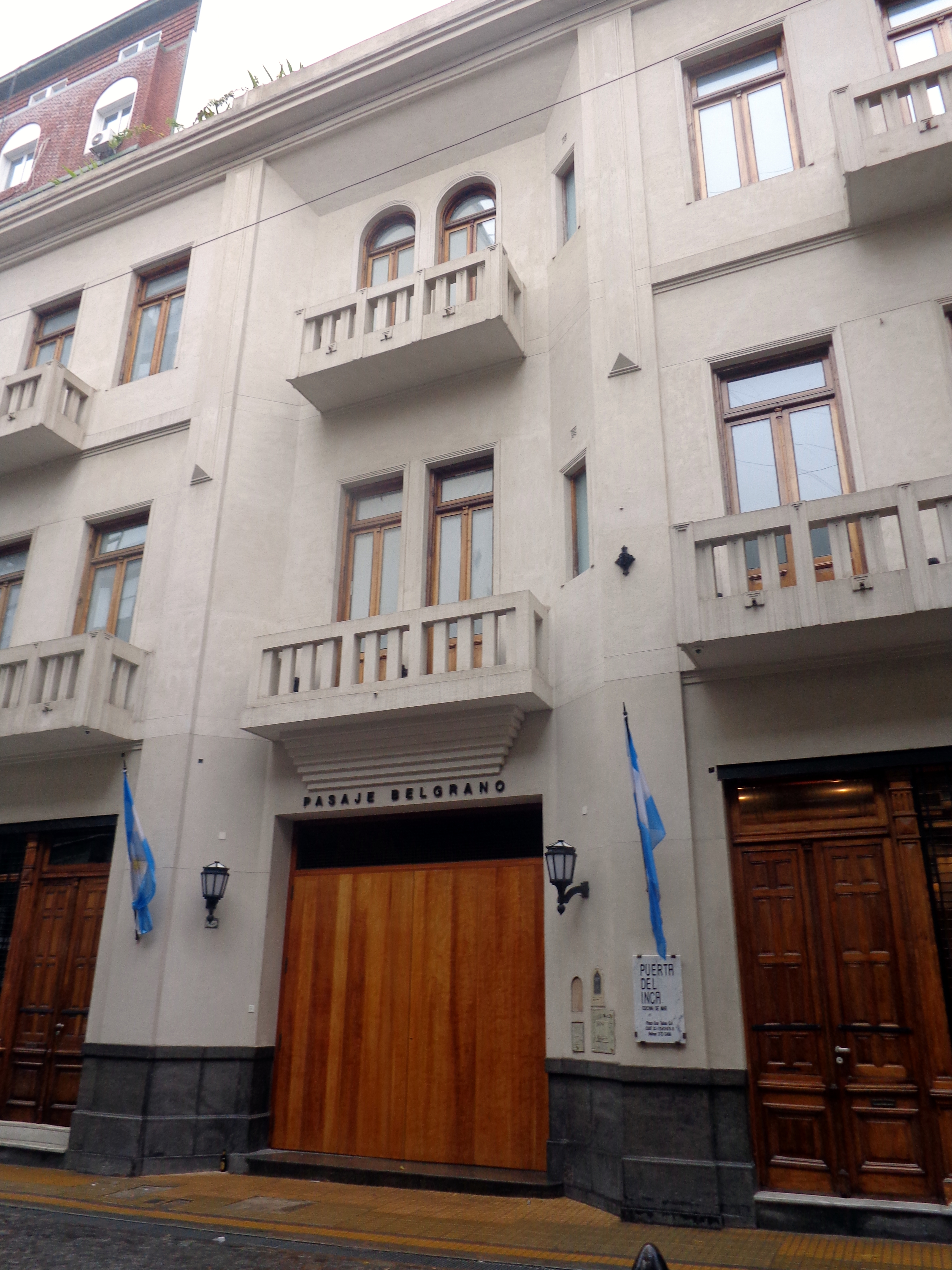 Pasaje Belgrano, en Bolivar esquina Belgrano, Buenos Aires, Argentina.